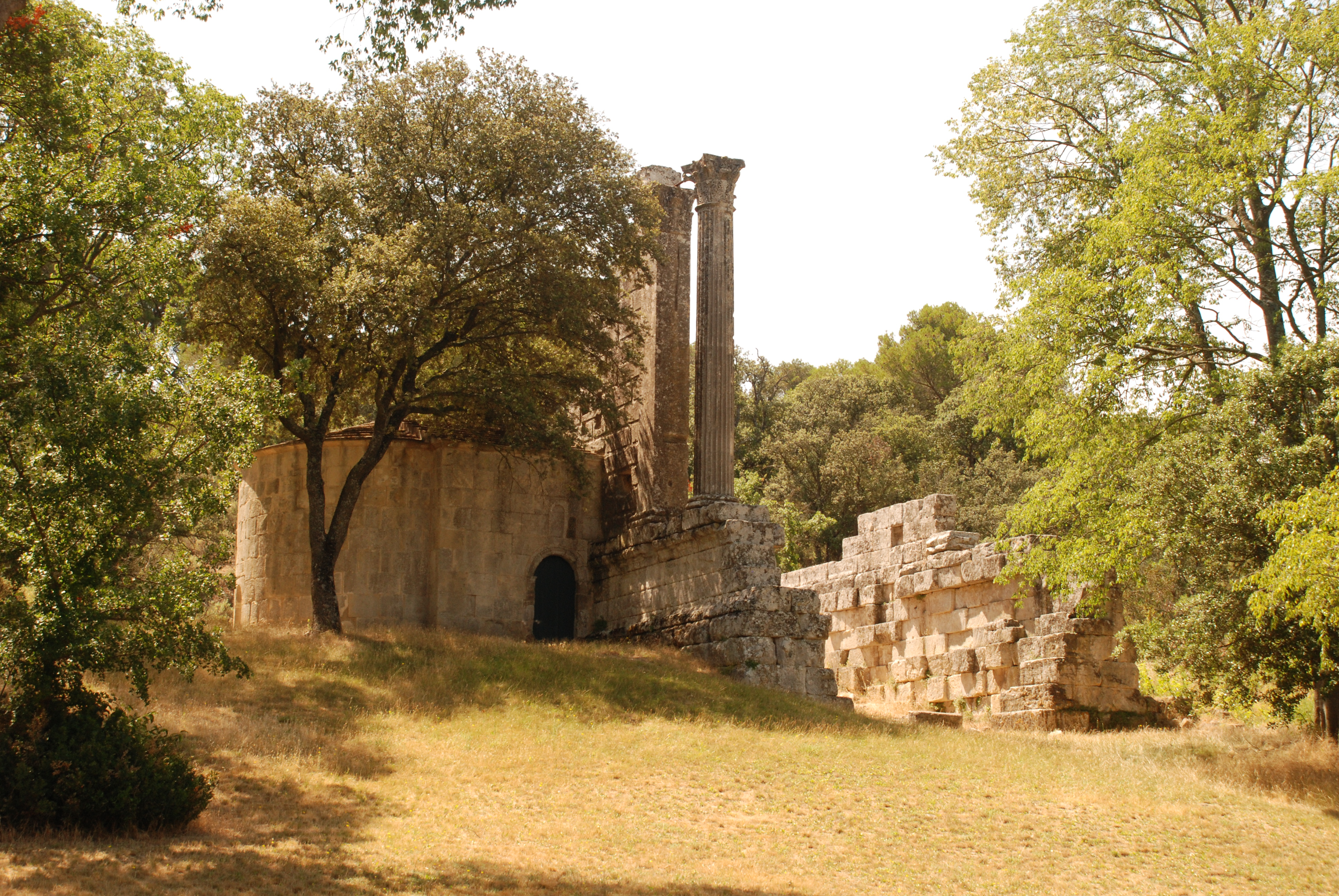 France - Provence - Chapelle Saint-Cézaire de Château-Bas